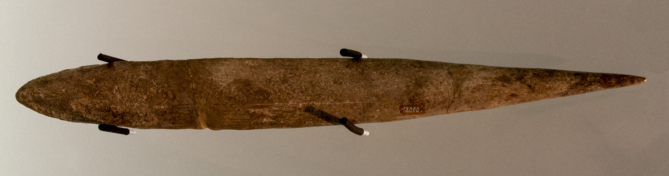 Lautscher Spitze aus der großen Badlhöhle bei Peggau, Österreich.